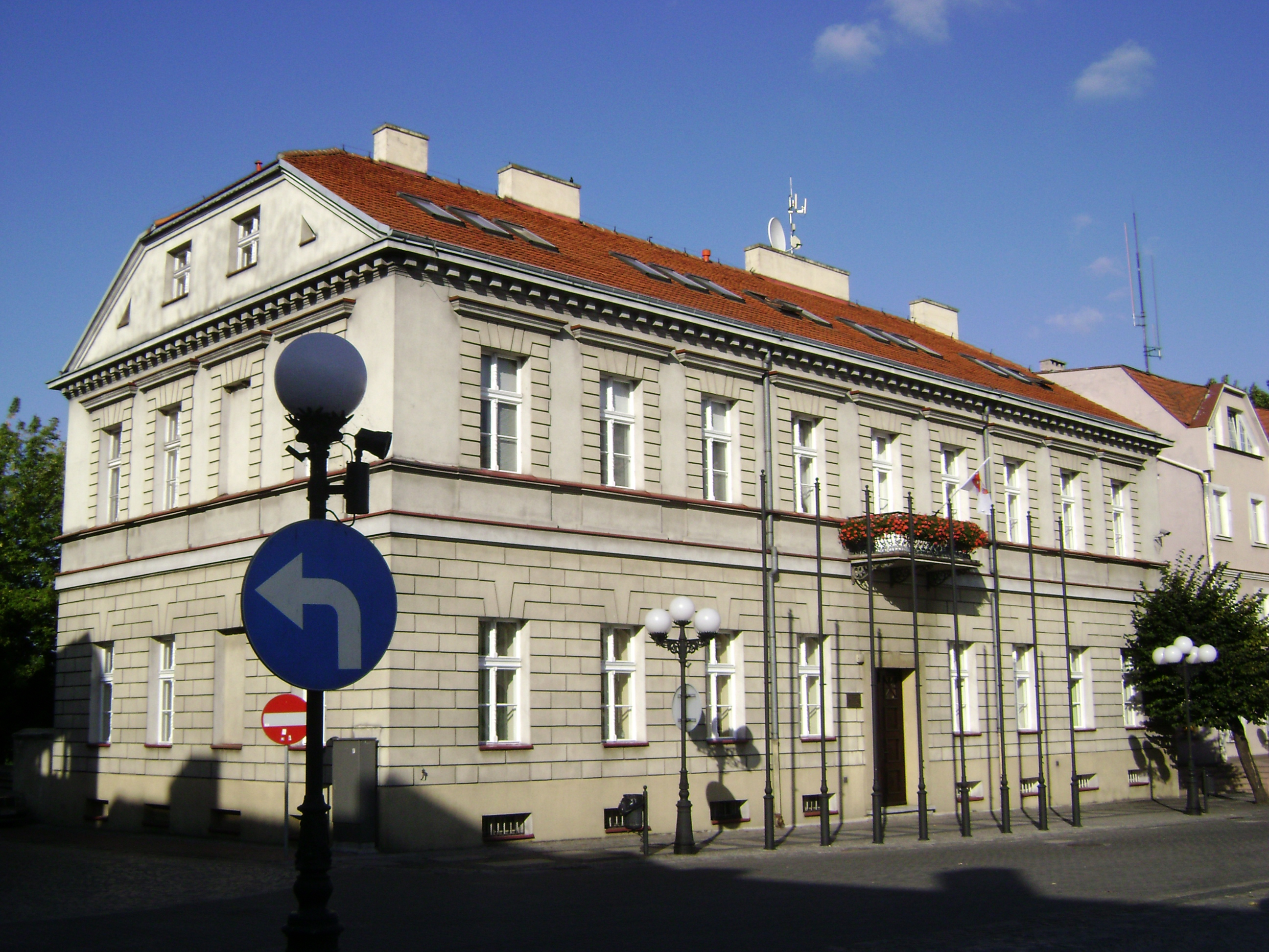 Konin pl. Wolności 1 - dawne starostwo powiatowe z połowy XIX wieku, obecnie Urząd Miejski